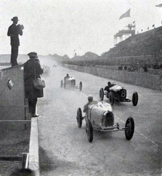 Départ du Grand Prix de l'A.C.F. 1925.